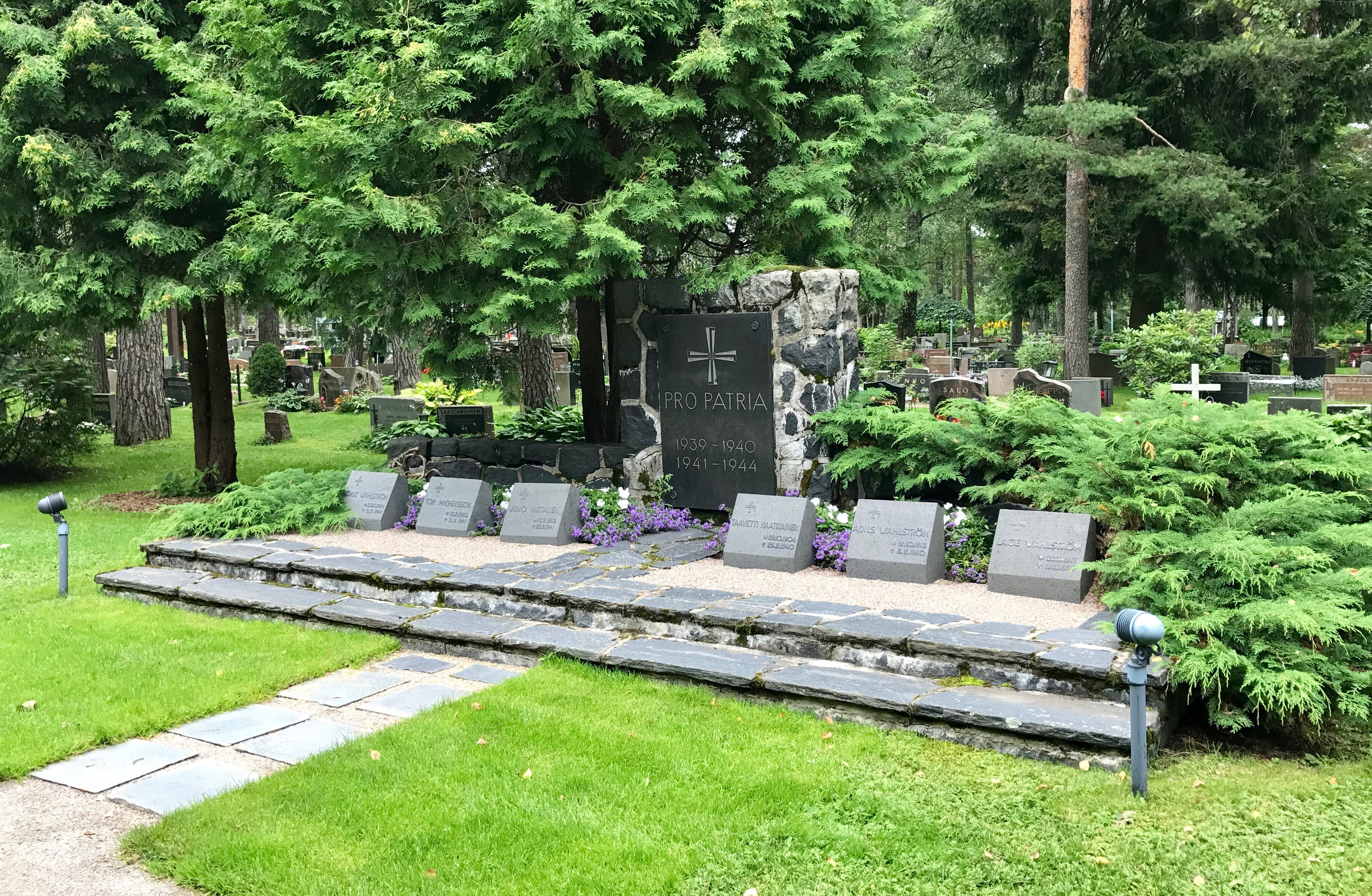 Ruskeasannan sankarihaudat Ruskeasannan hautausmaalla.